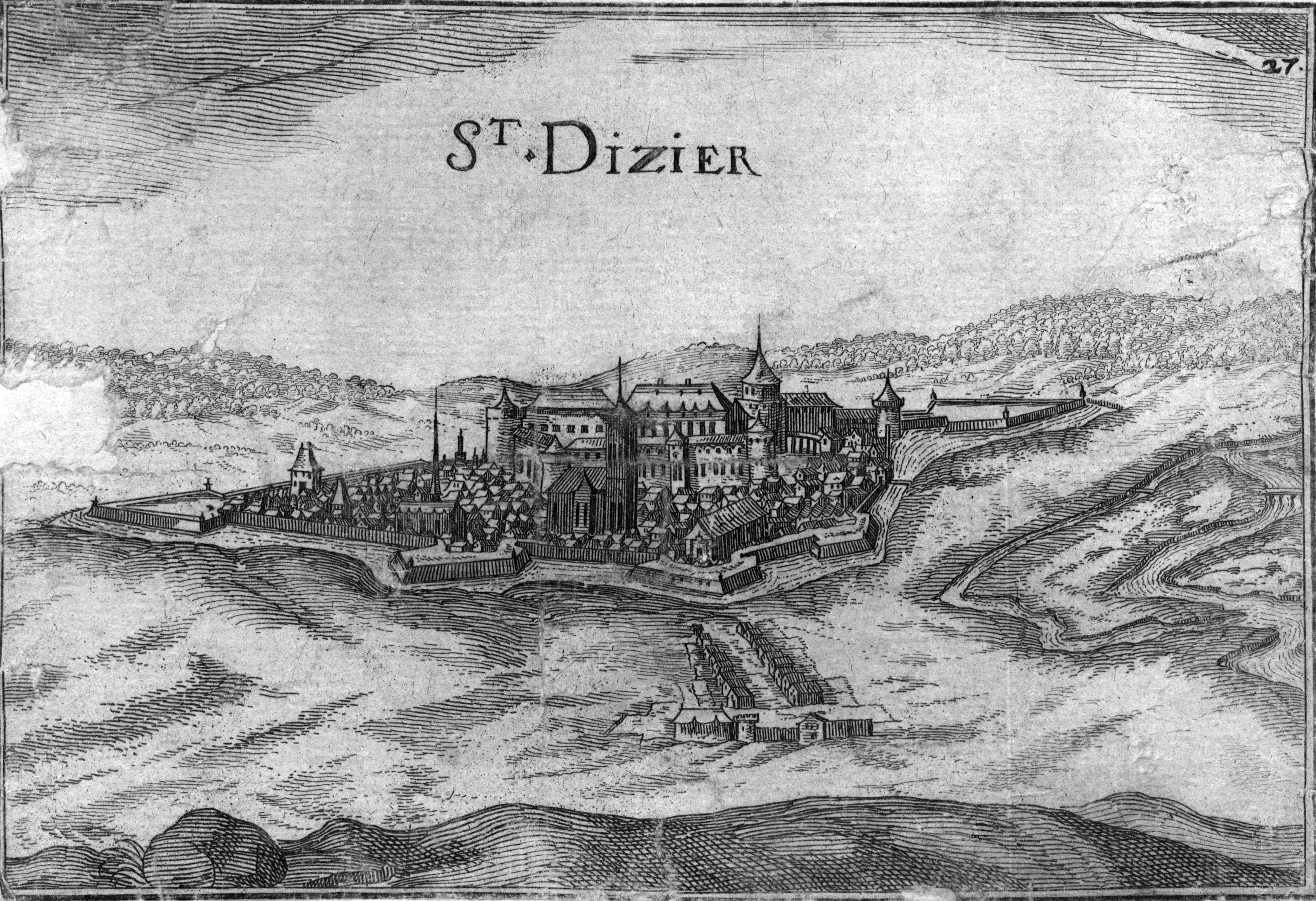 St-Dizier in Davanne-Chappier.